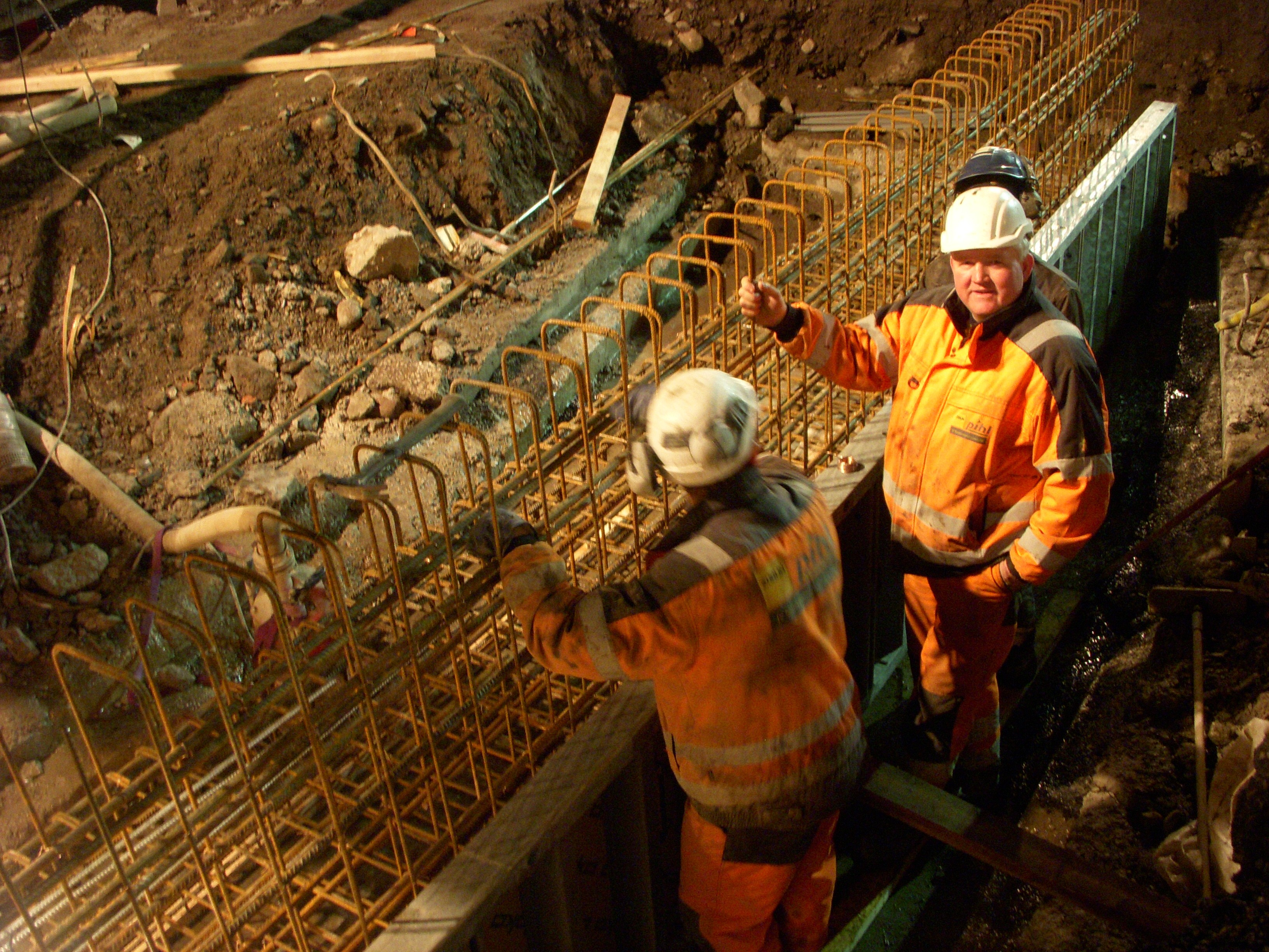 Arbeten med Citybanan vid Söder Mälarstrand i Stockholm